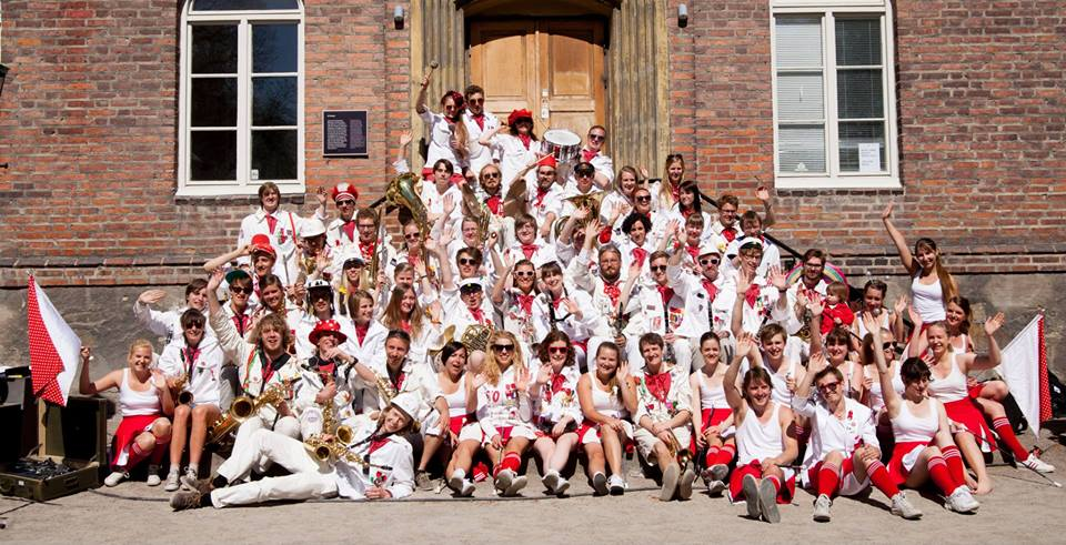 Bleckhornen på Tegnérsplatsen, Lund, efter vårkoncerten den 1 maj 2014.